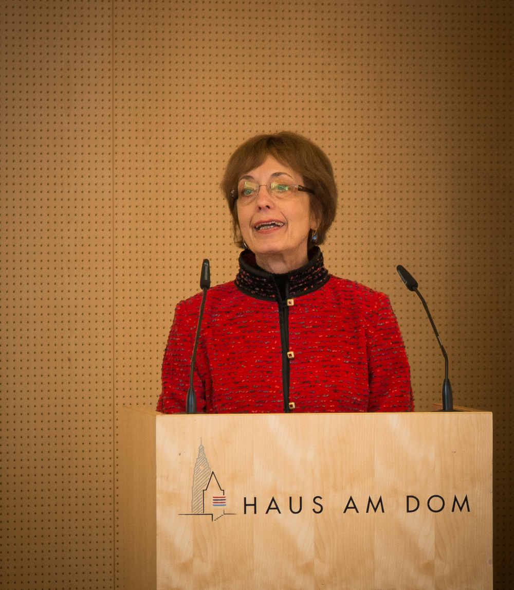 Petra Maisak auf einer Veranstaltung des Freien Deutschen Hochstiftes im Haus am Dom in Frankfurt am Main (Dezember 2013)